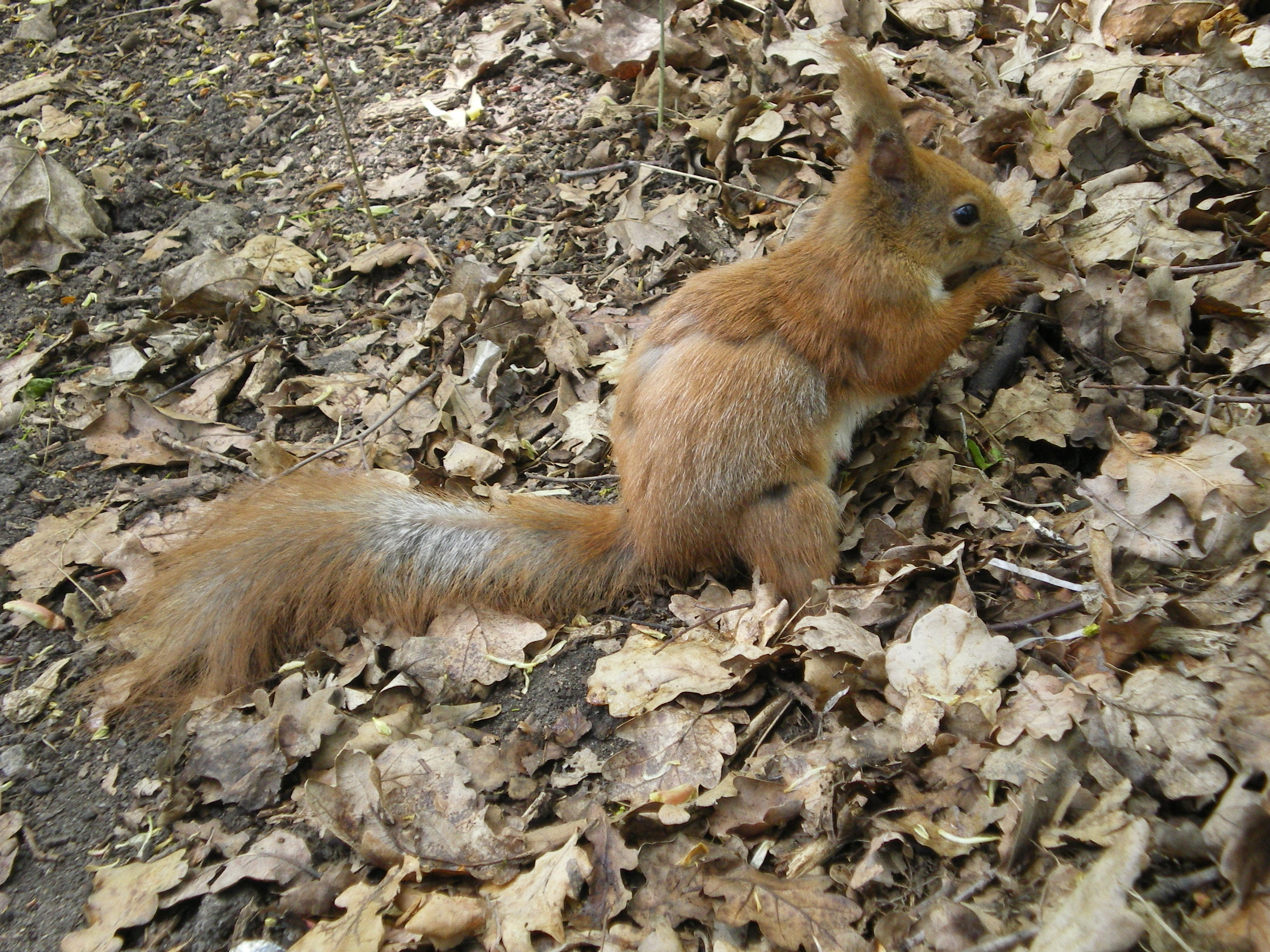 Белка обыкновенная (векша) в дубовых листьях. Харьковский Лесопарк, 9 мая 2007.